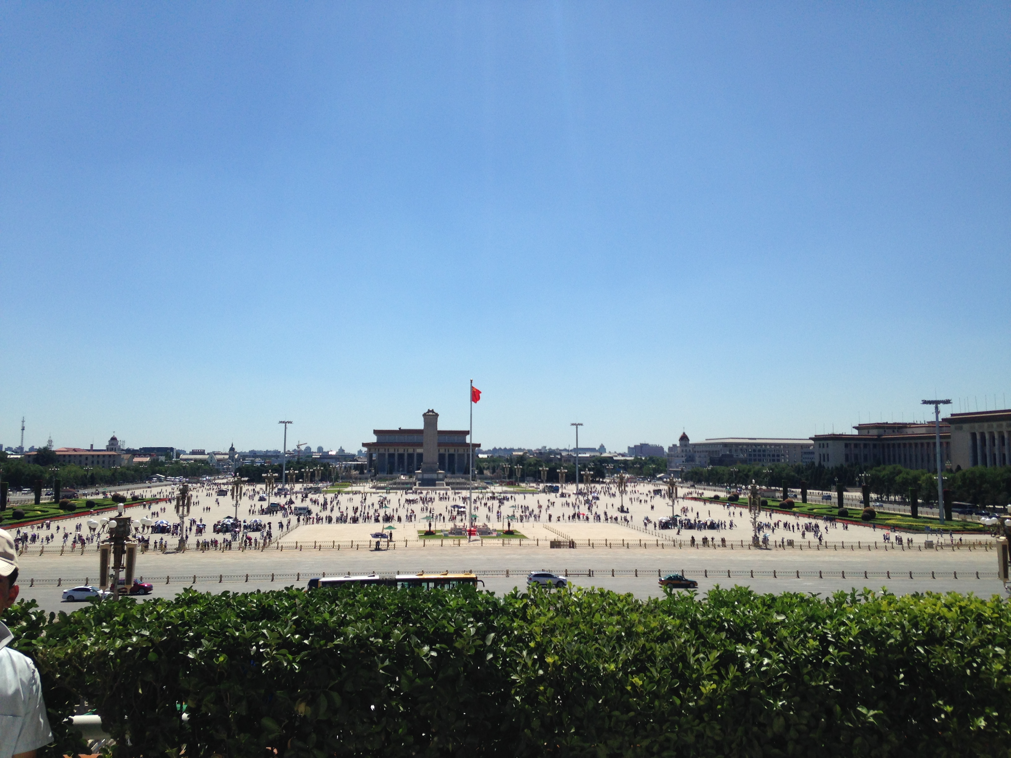 天安門より望む天安門広場